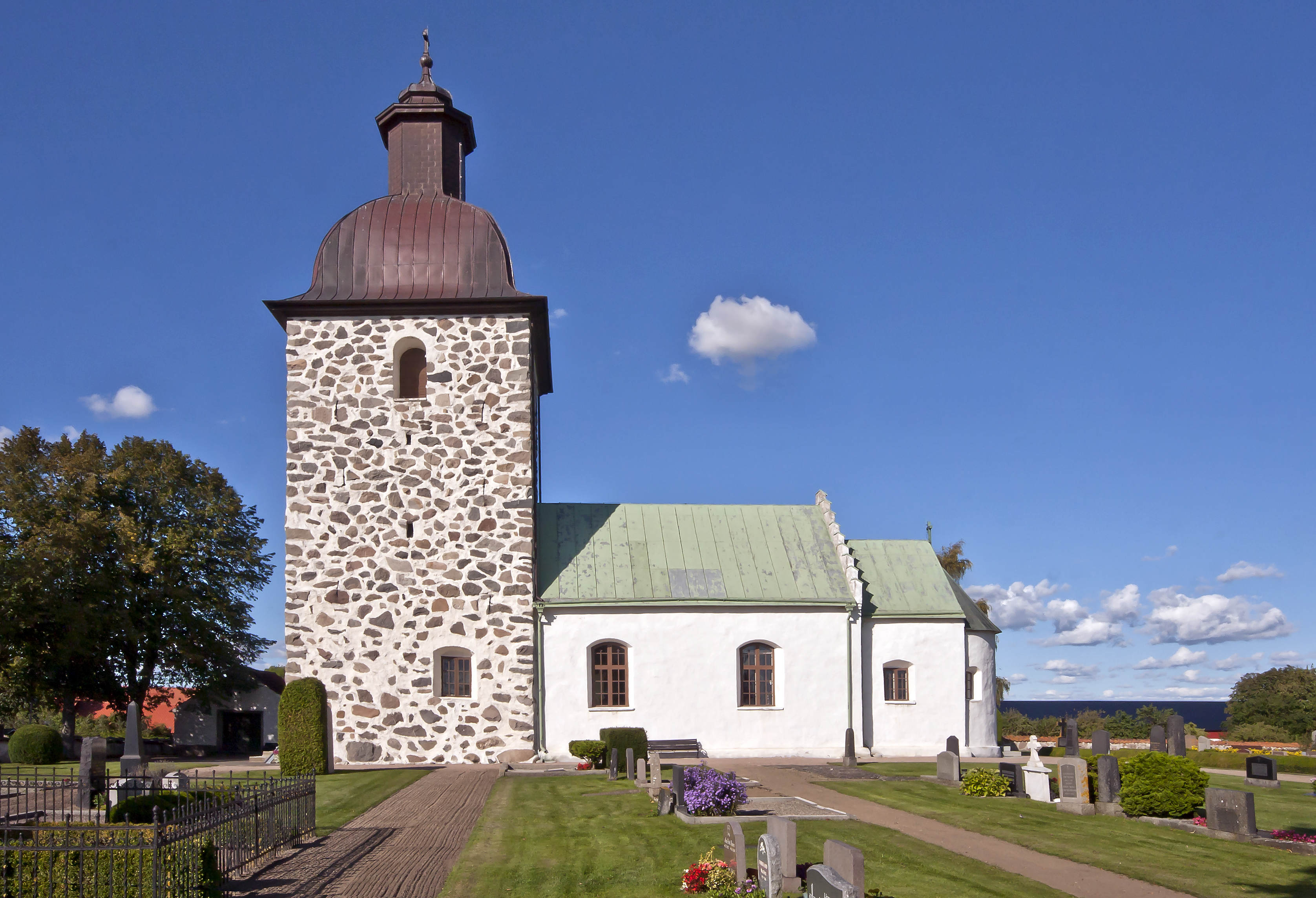 Gustav Adolfs kyrka i Viby utanför Kristianstad.